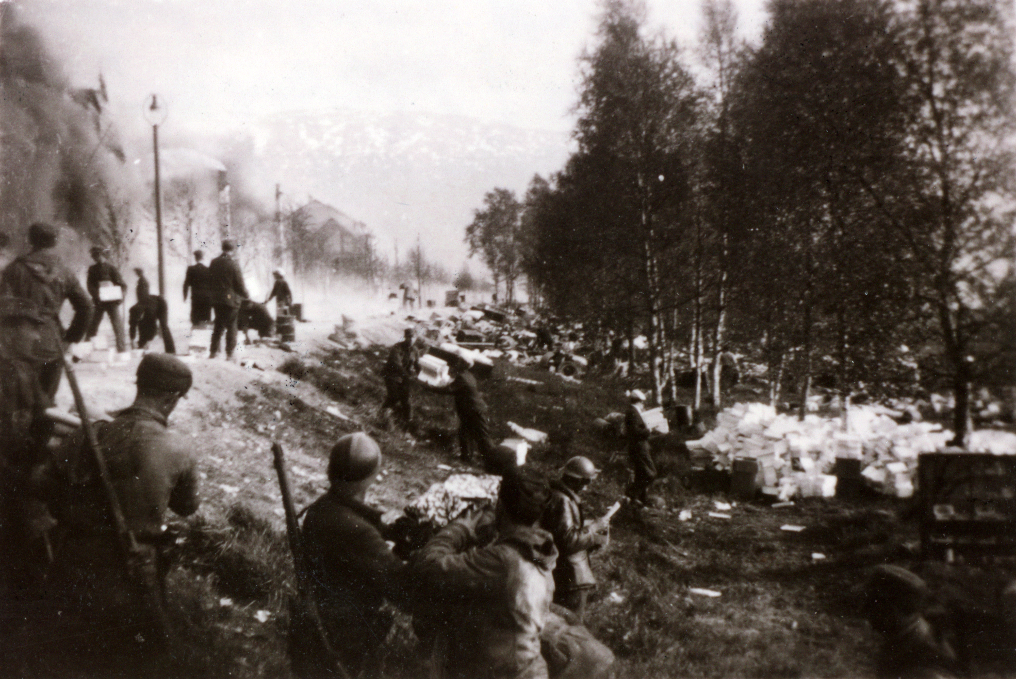 Allierte soldater under kampene om Narvik Tittel / Title: Engelske og franske soldater under kampene om Narvik Dato / Date: Juni 1940 Fotograf / Photographer: Ukjent/Unknown Sted / Place: Narvik, Nordland, Norge Eier / Owner Institution: Arkiv i Nordland Lenke / Link: Arkiv i Nordland Arkivreferanse /Archive reference: AIN.NA143.0009 Fra Dag Skogheims Privatarkiv Tekst bak på bildet: Wahrscheinlich kampfraum Narvik 1940! Französschise und wahrscheinlich norw. Soldaten bei einer truppenversorgung? Knipste hier ein gefangener Deutscher soldat? Wie kam das foto in Deutsche hand? Ein grosses rätsel! Oder schiffs brüchige Deutsche matrosen versorgen sich mit (...). Ausr(...)?